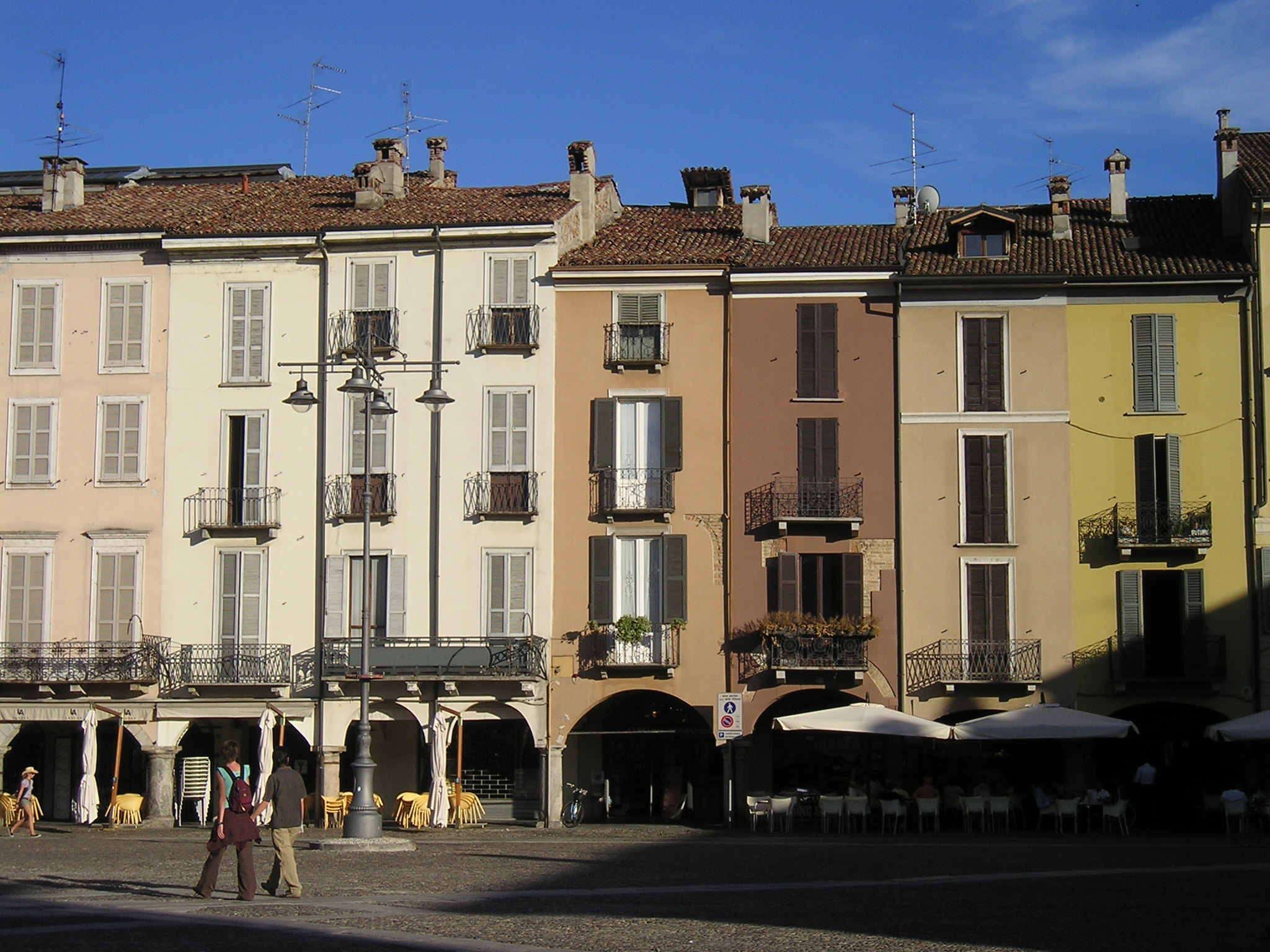 Scorcio di piazza della Vittoria a Lodi